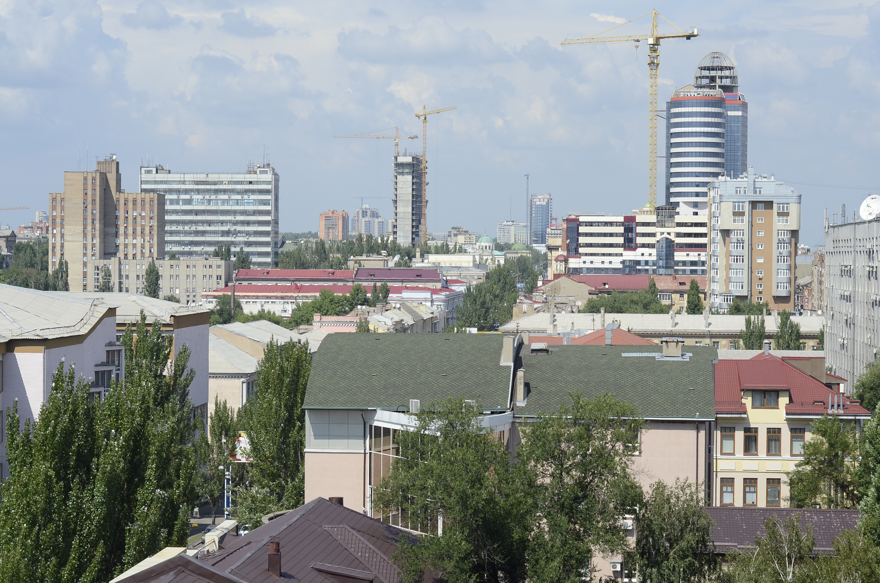 Вид Донецка из торгово-развлекательного комплекса Green Plaza